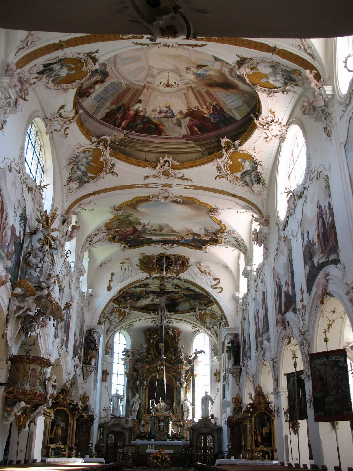 Innenansicht des Kirchenschiffs der Gutenzeller Kirche.